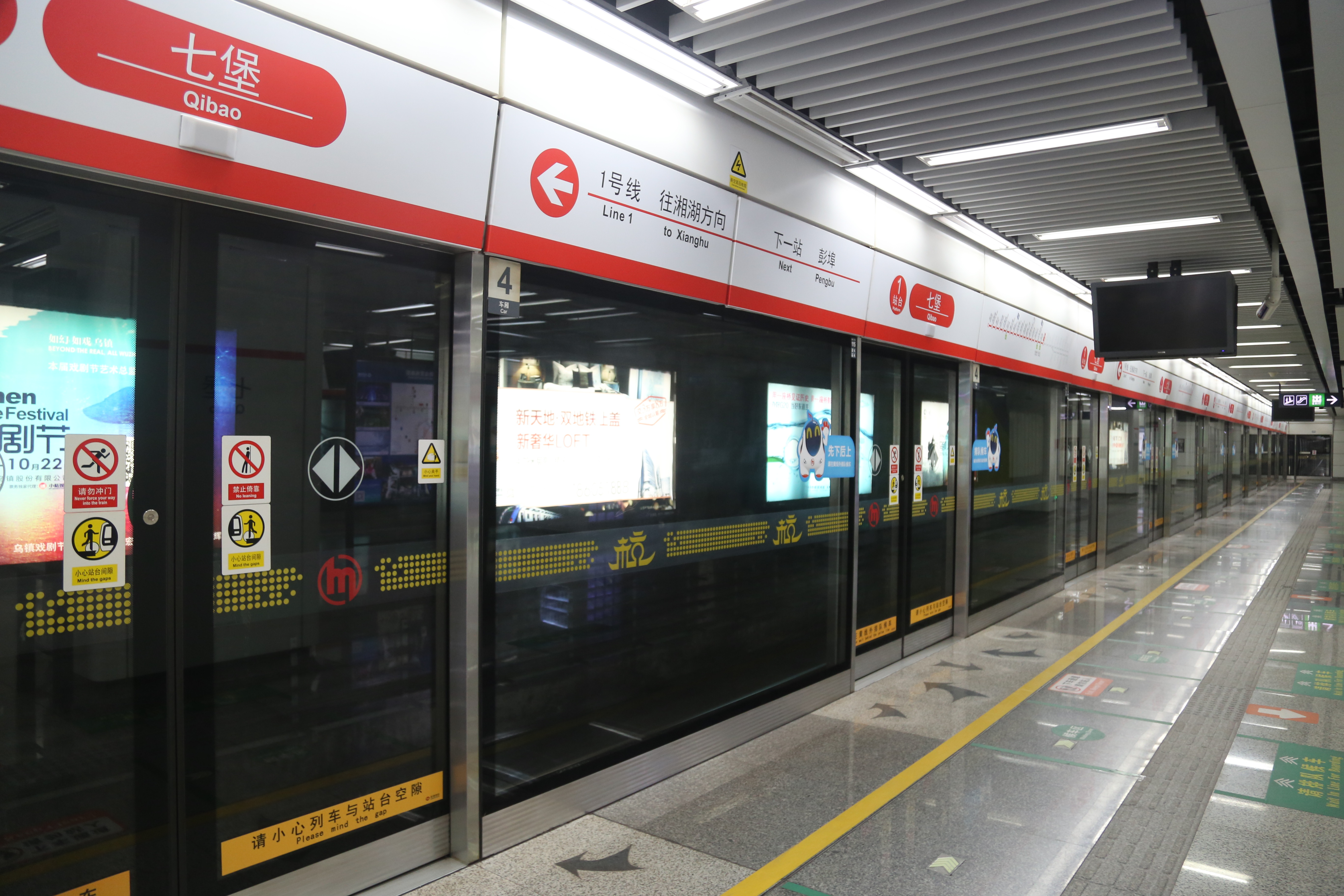 杭州地铁七堡站站台